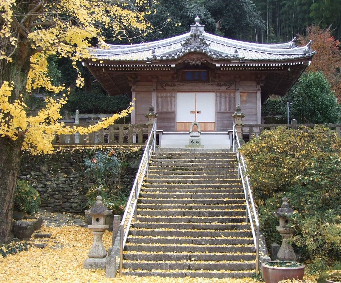 正法寺の蔵王堂